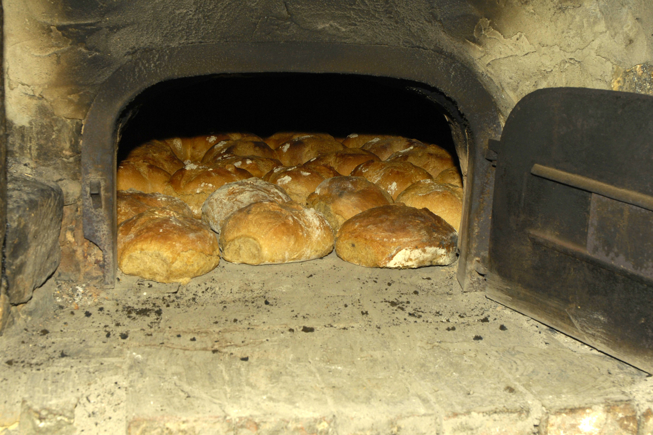 Façade sud avec oeuvre de Charles Belle sur la porte de grange.